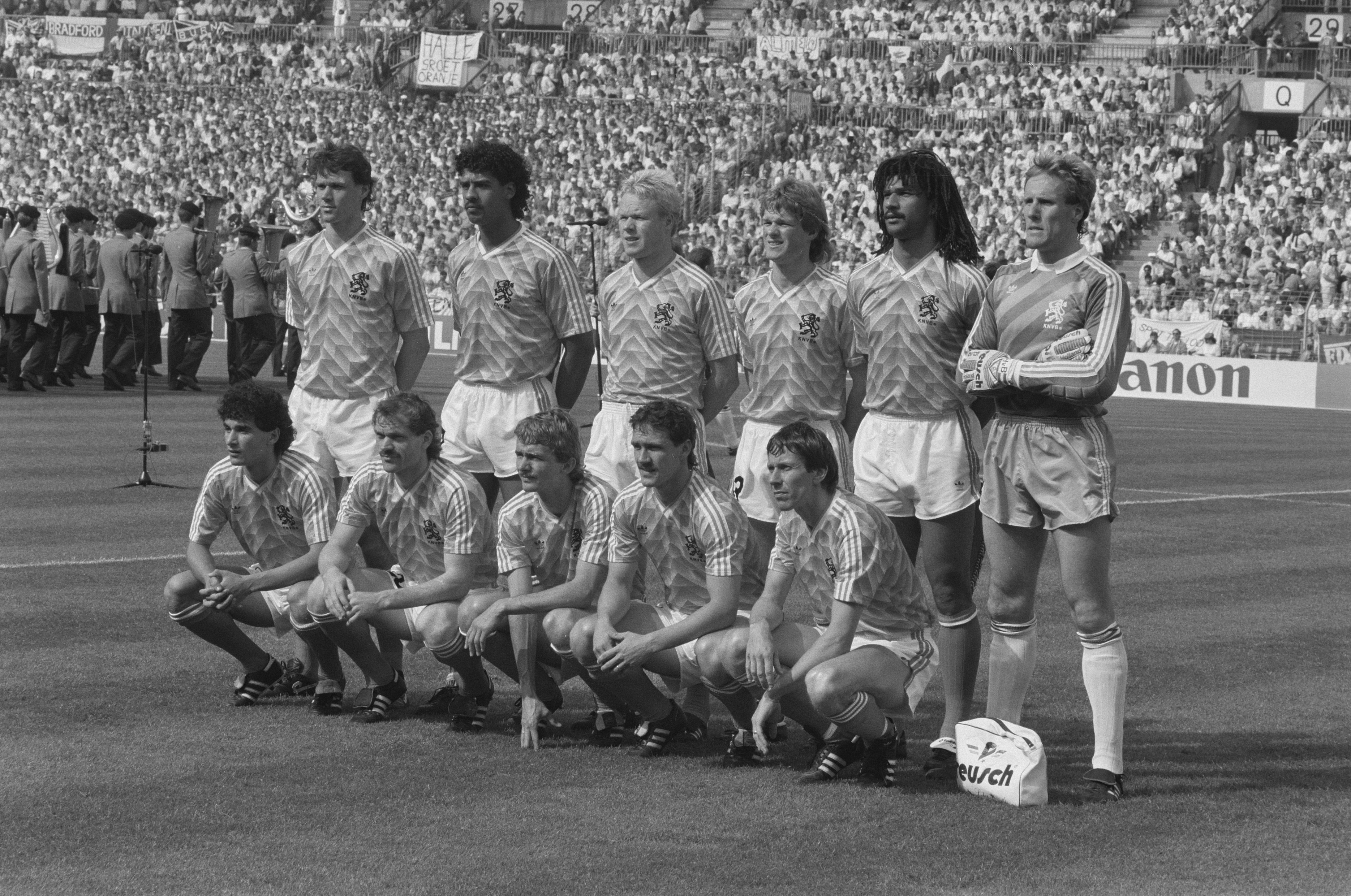 Collectie / Archief : Fotocollectie Anefo Reportage / Serie : [ onbekend ] Beschrijving : EK voetbal in West Duitsland ; Nederland tegen Ierland 1 Van Basten, Rijkaard, R. Koeman, E. Koeman, Gullit en Van Breukelen Datum : 18 juni 1988 Locatie : Duitsland, Ierland, Nederland Trefwoorden : sport, voetbal Persoonsnaam : Basten, Marco van, Gullit, Ruud, Koeman, E., Koeman, Ronald, Mühren, Gerry, Rijkaard, Frank, Vanenburg, Gerald Fotograaf : Bogaerts, Rob / Anefo Auteursrechthebbende : Nationaal Archief Materiaalsoort : Negatief (zwart/wit) Nummer archiefinventaris : bekijk toegang 2.24.01.05 Bestanddeelnummer : 934-2697